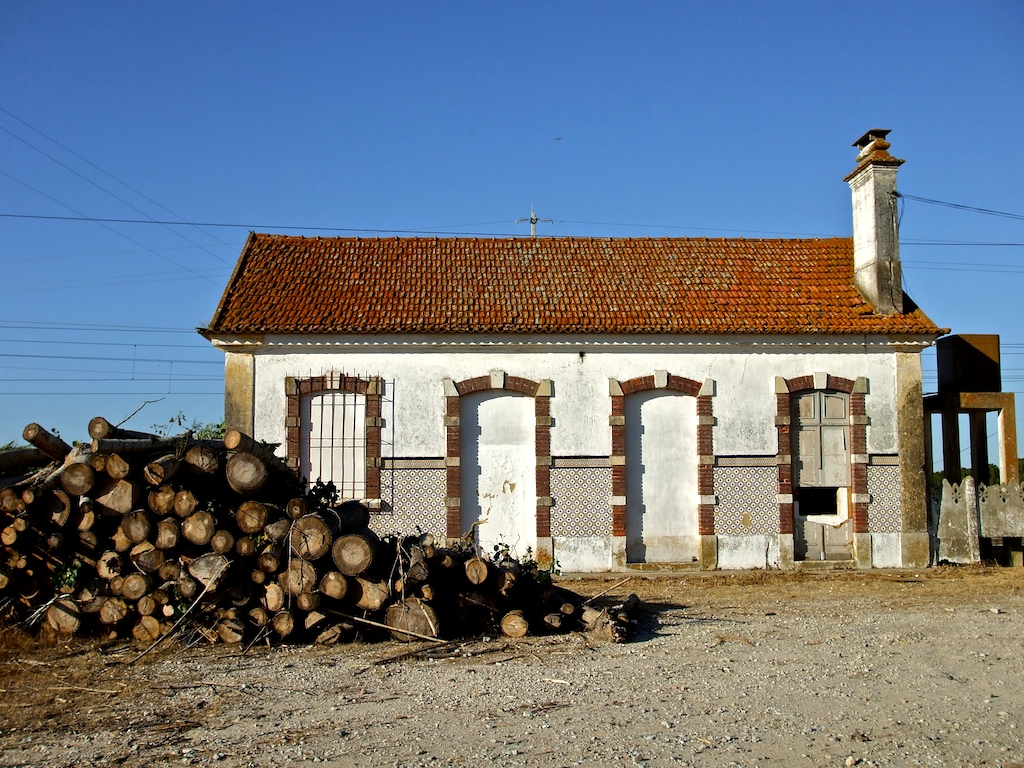 Tipo: EC Estação de Concentração Local: Quinta Grande (Coruche) Linha de Vendas Novas, PK 34 Data e hora: 8 de Julho de 2008 19h11